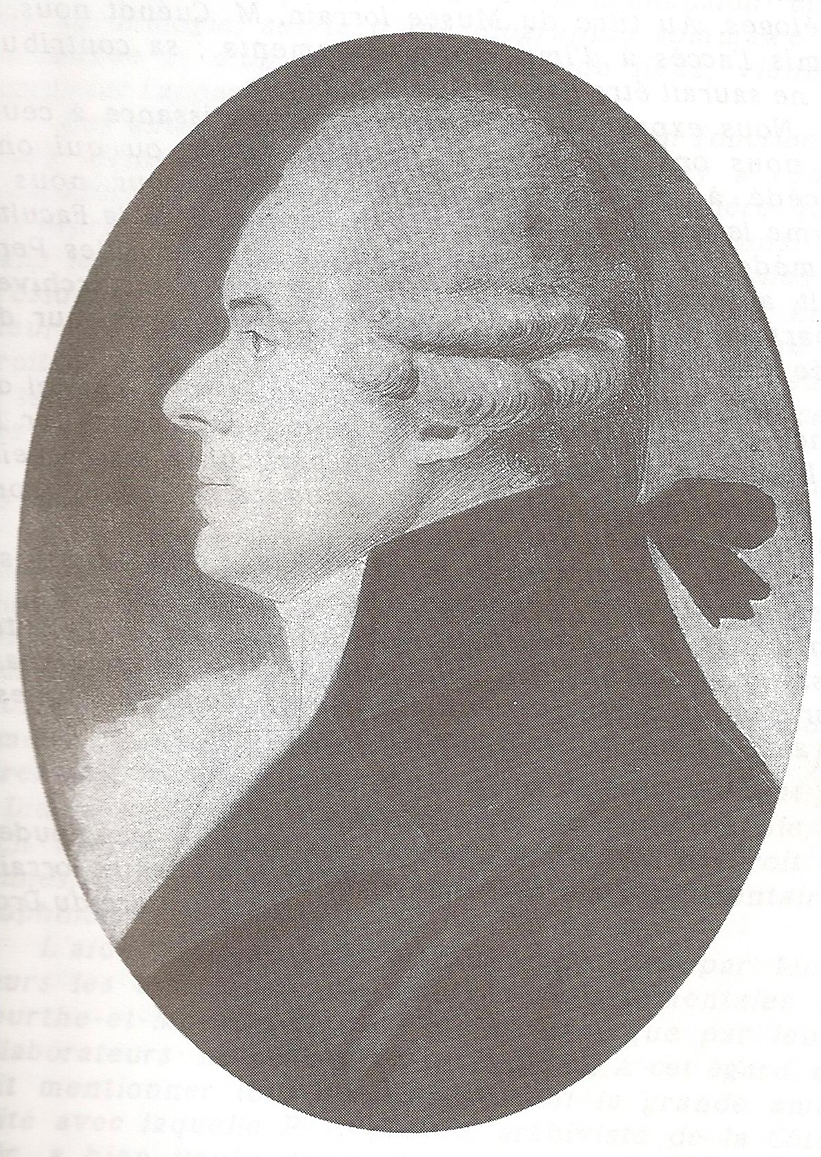 Portrait de Michel Joseph CŒURDEROY, Premier Président de la cour souveraine de Nancy